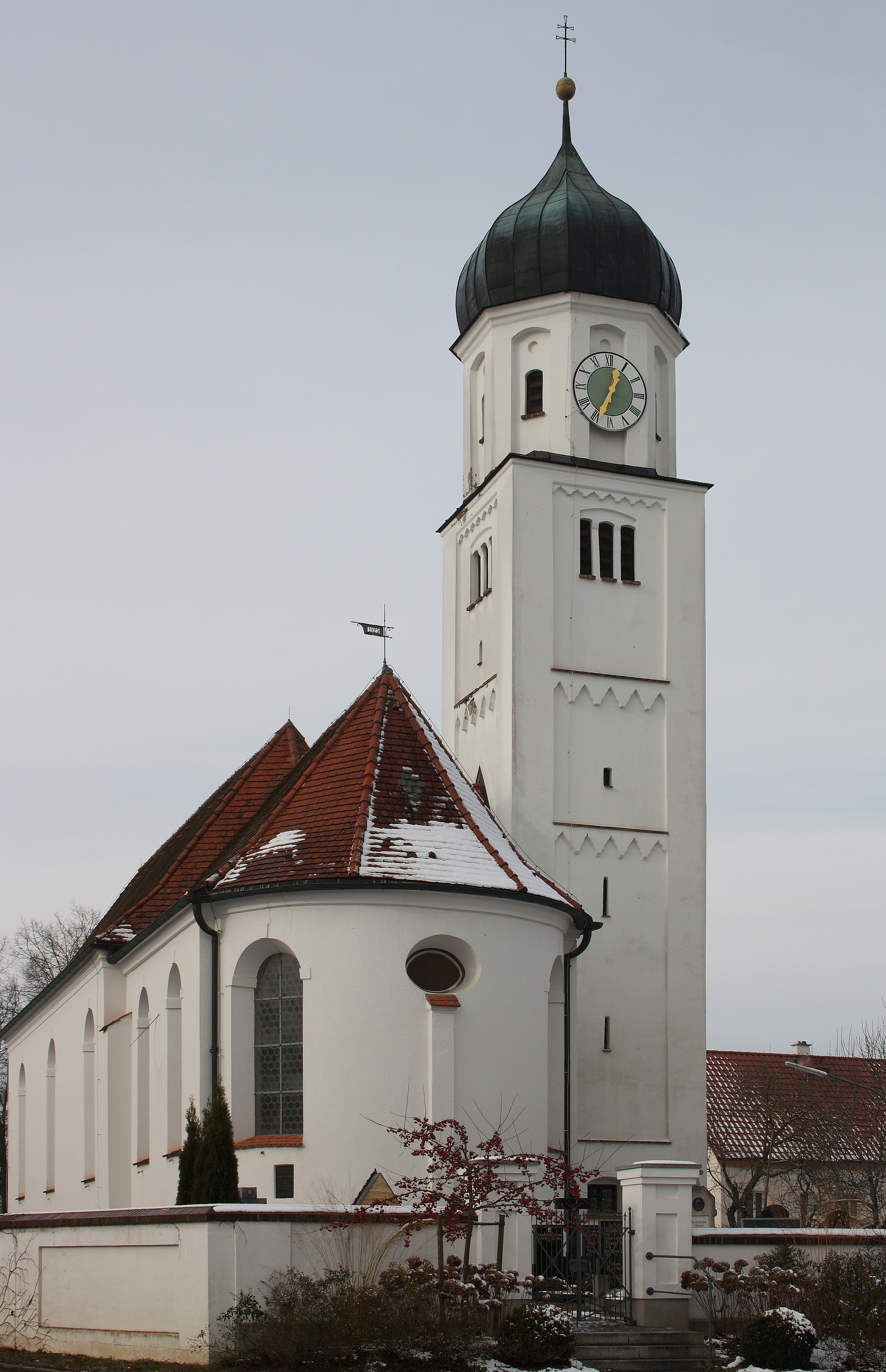 Katholische Pfarrkirche St. Leonhard in Baiershofen, einem Ortsteil der Gemeinde Altenmünster im Landkreis Augsburg (Bayern), Ansicht von Osten